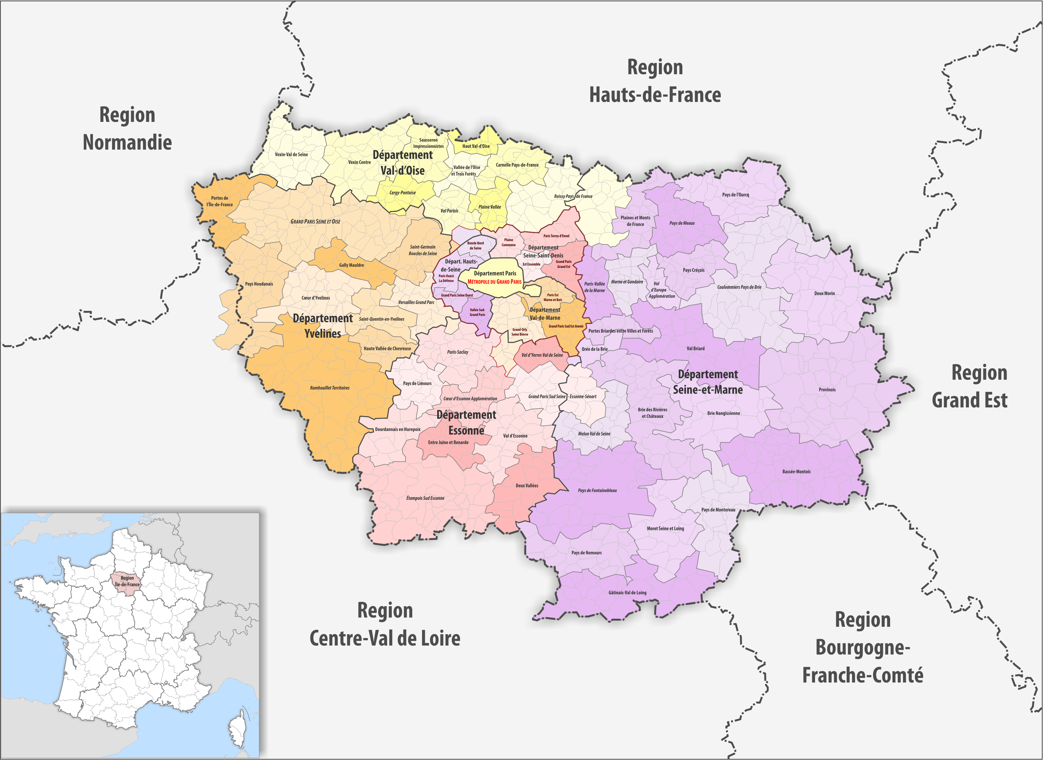 Gemeinden, Gemeindeverbände und Départemente in der Region Île-de-France